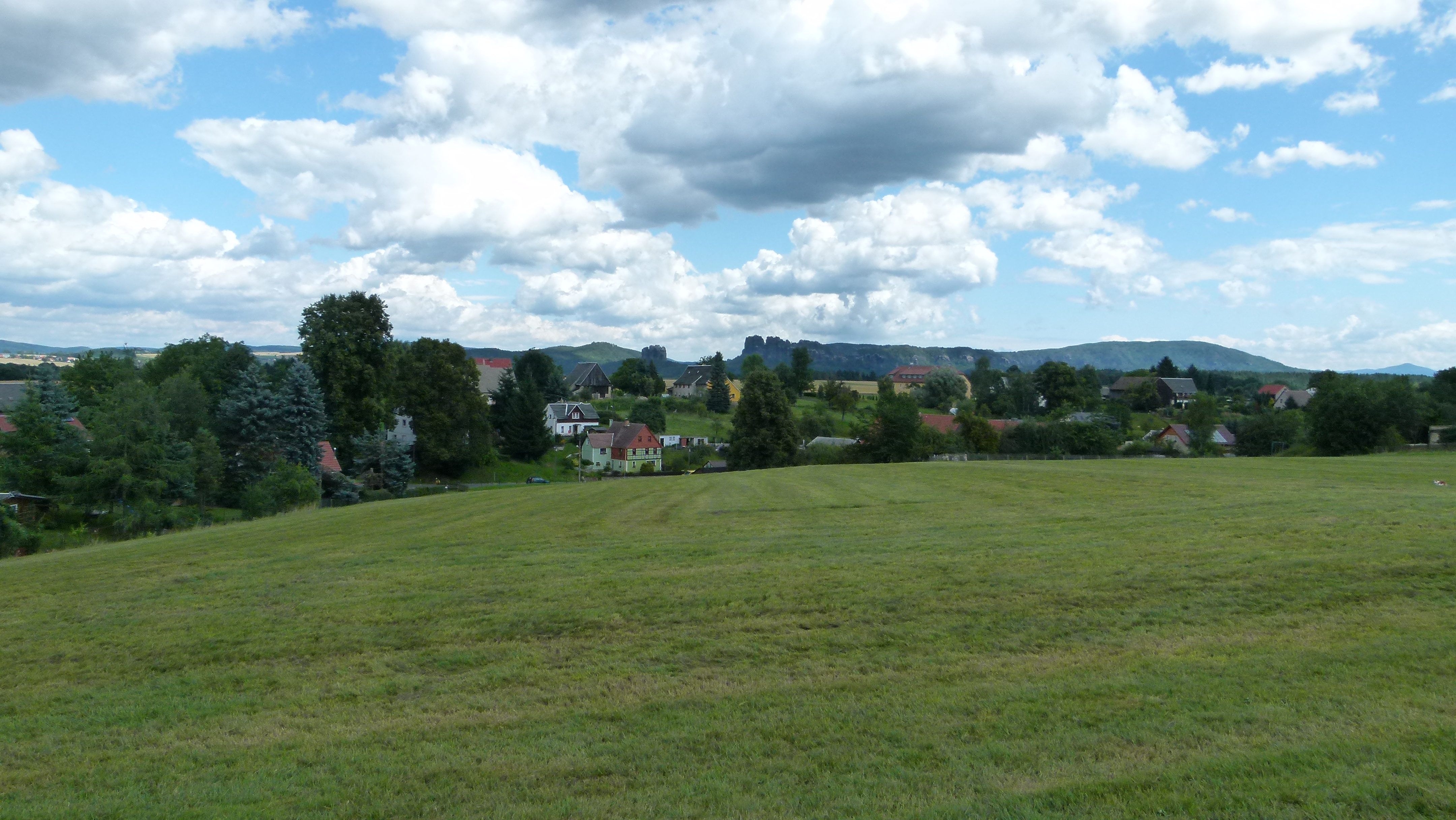 Blick auf Kleinhennersdorf, Sächsische Schweiz